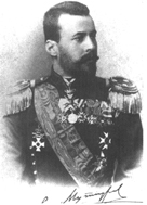 Foto von Sawa Mutkurow